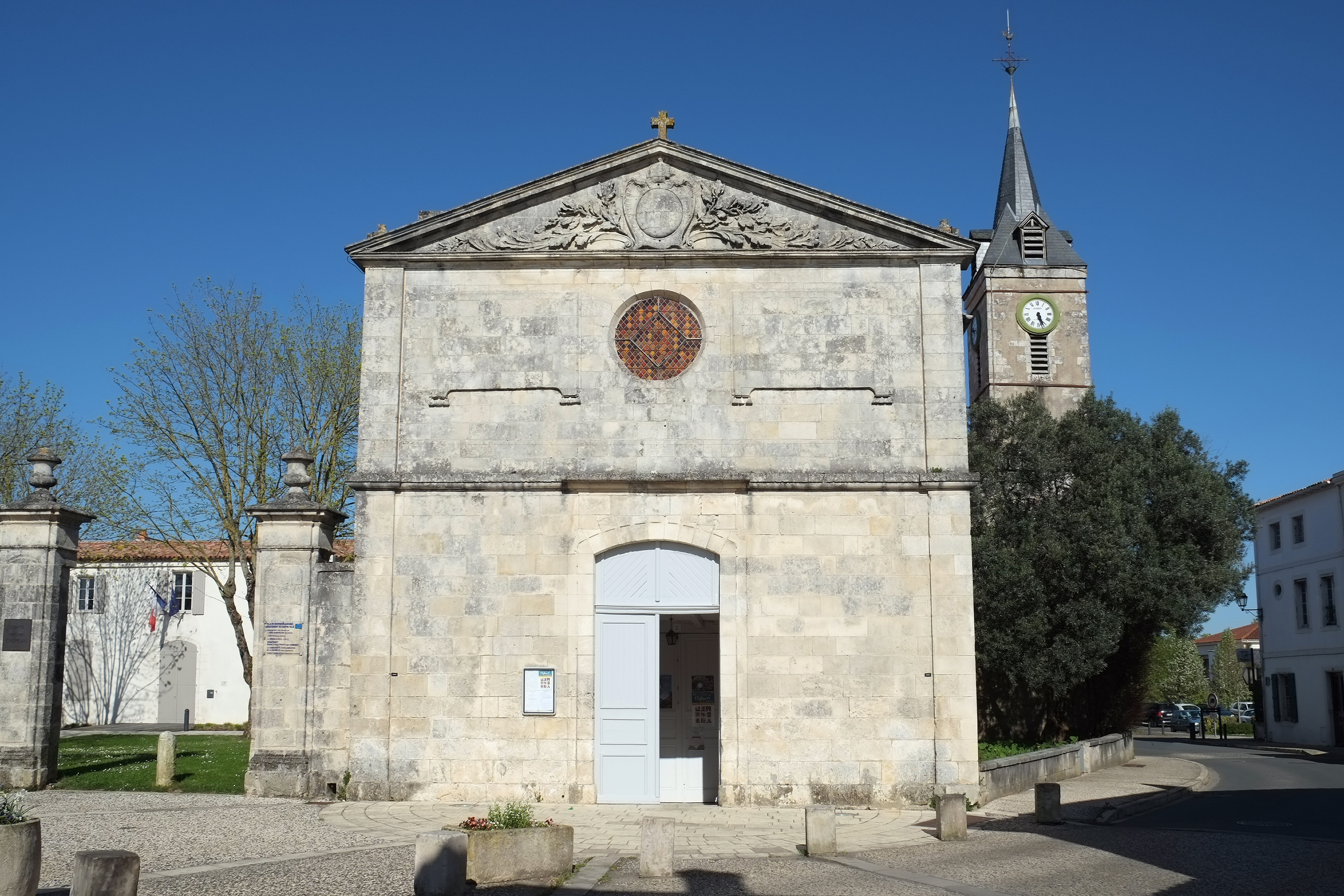 Église Saint-Pierre Dompierre-sur-Mer Charente-Maritime France